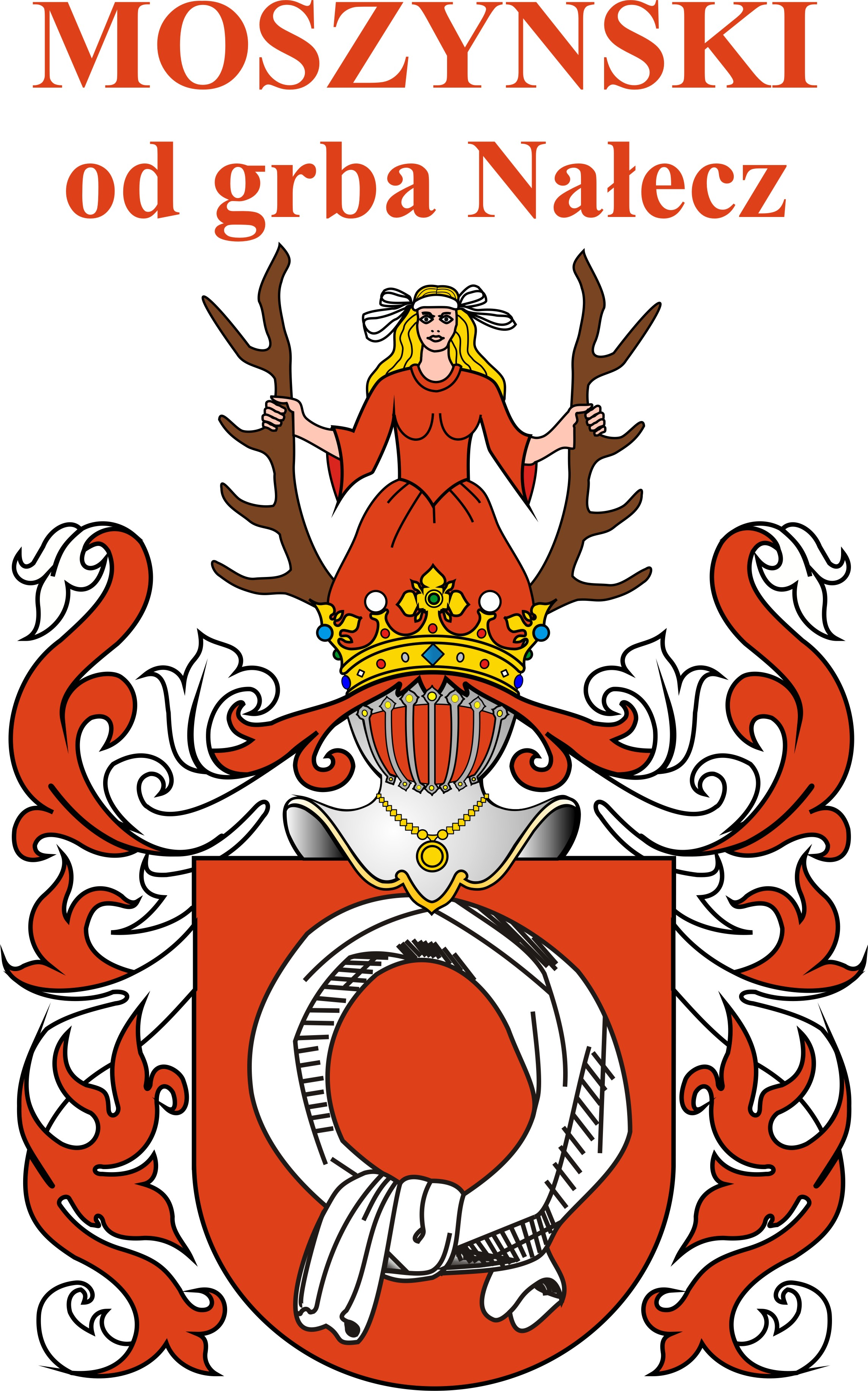 Grb obitelji Moszynsski od grba Nałecz